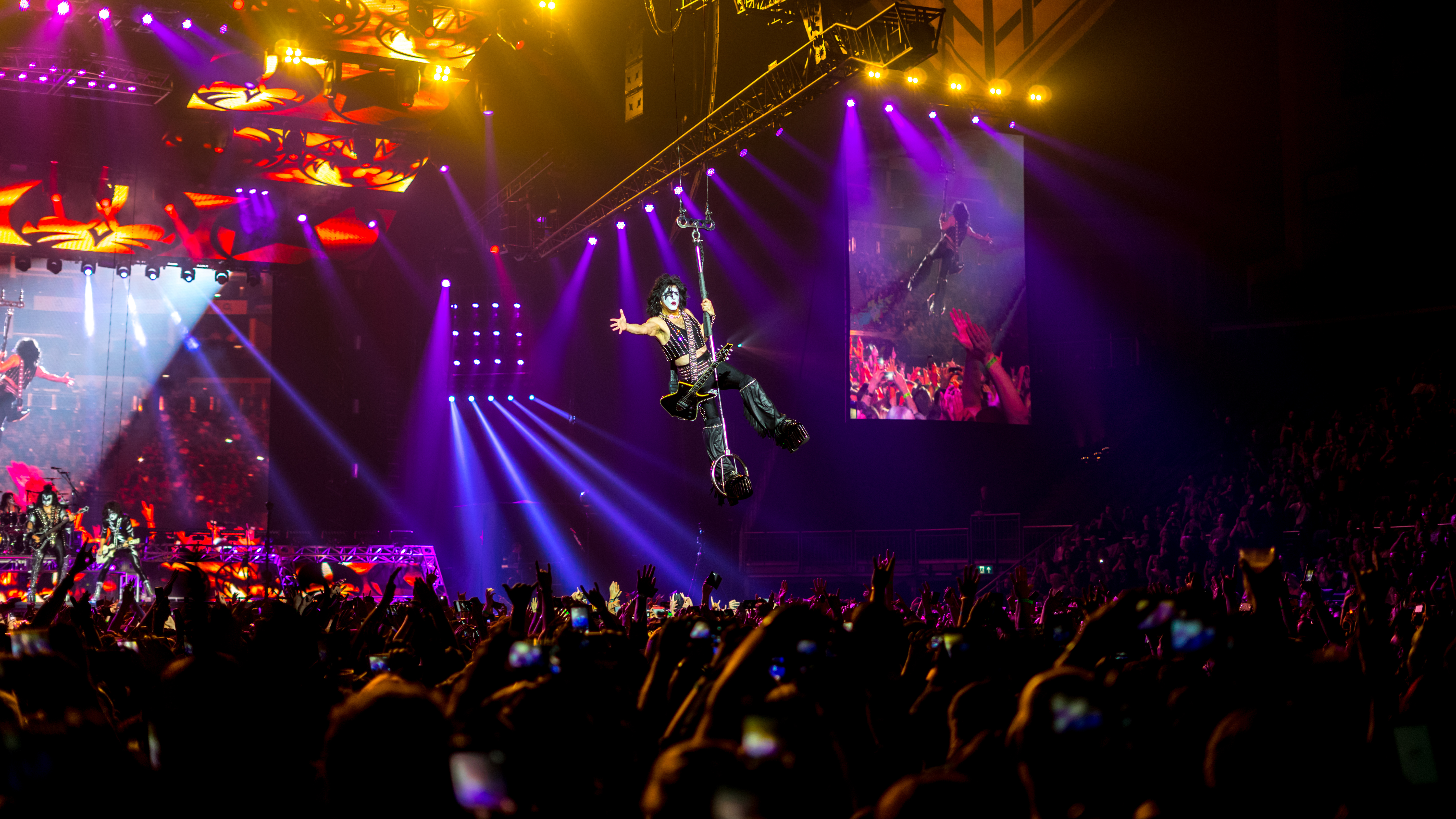 KissO2310517-30